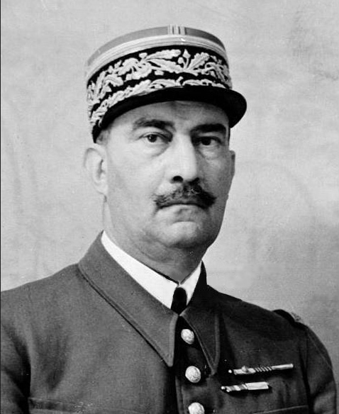 Le général Henri Dentz, photographie publiée dans le journal Le Matin, 9 juin 1941.